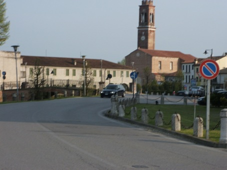 autore:groucho85 fonte:groucho85 descrizione: Villadose, Via Umberto I licenza d'uso: pubblico dominio note: foto scattata da me, groucho85, per wikipedia